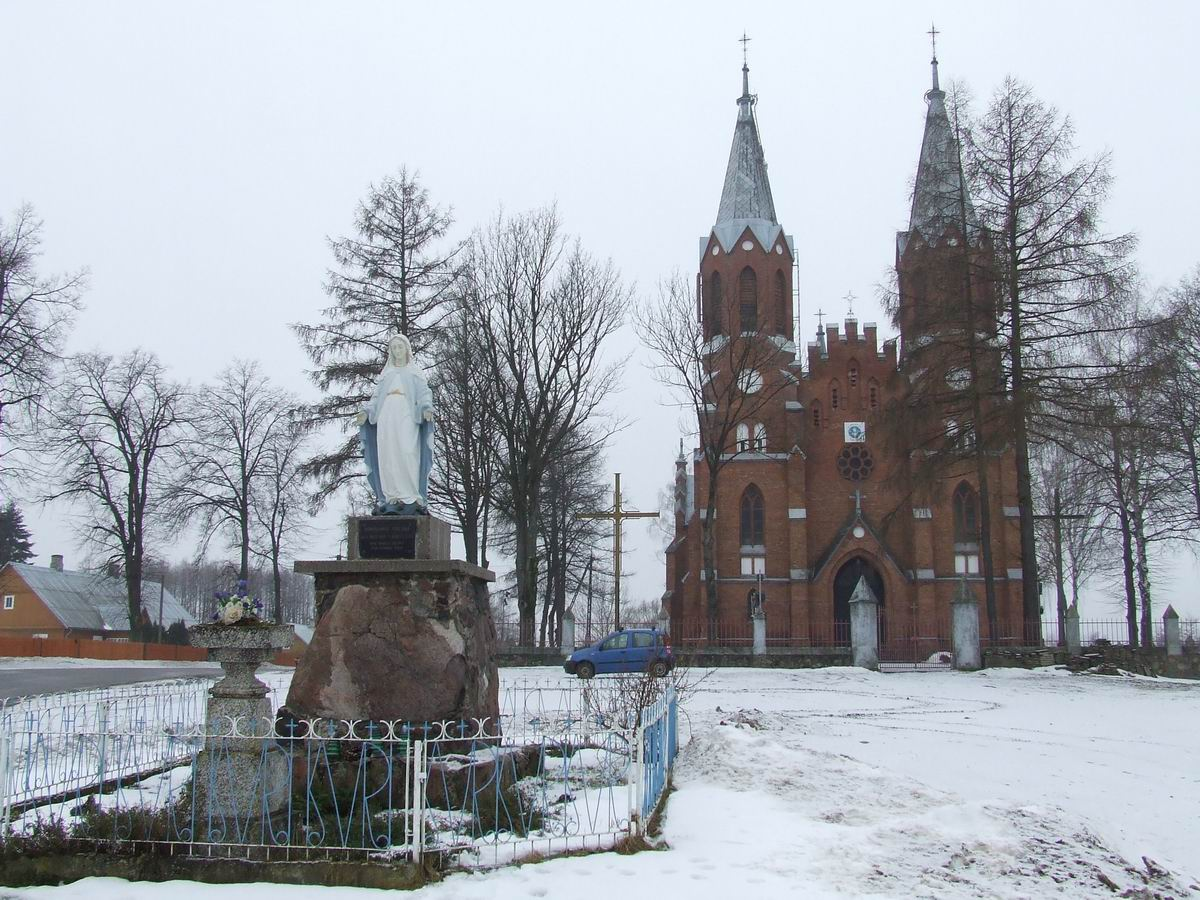 Czarna Wieś Kościelna - kościół parafialny pw. Matki Boskiej Anielskiej, 1913-21 (zabytek nr A-356 z 4.07.2011)